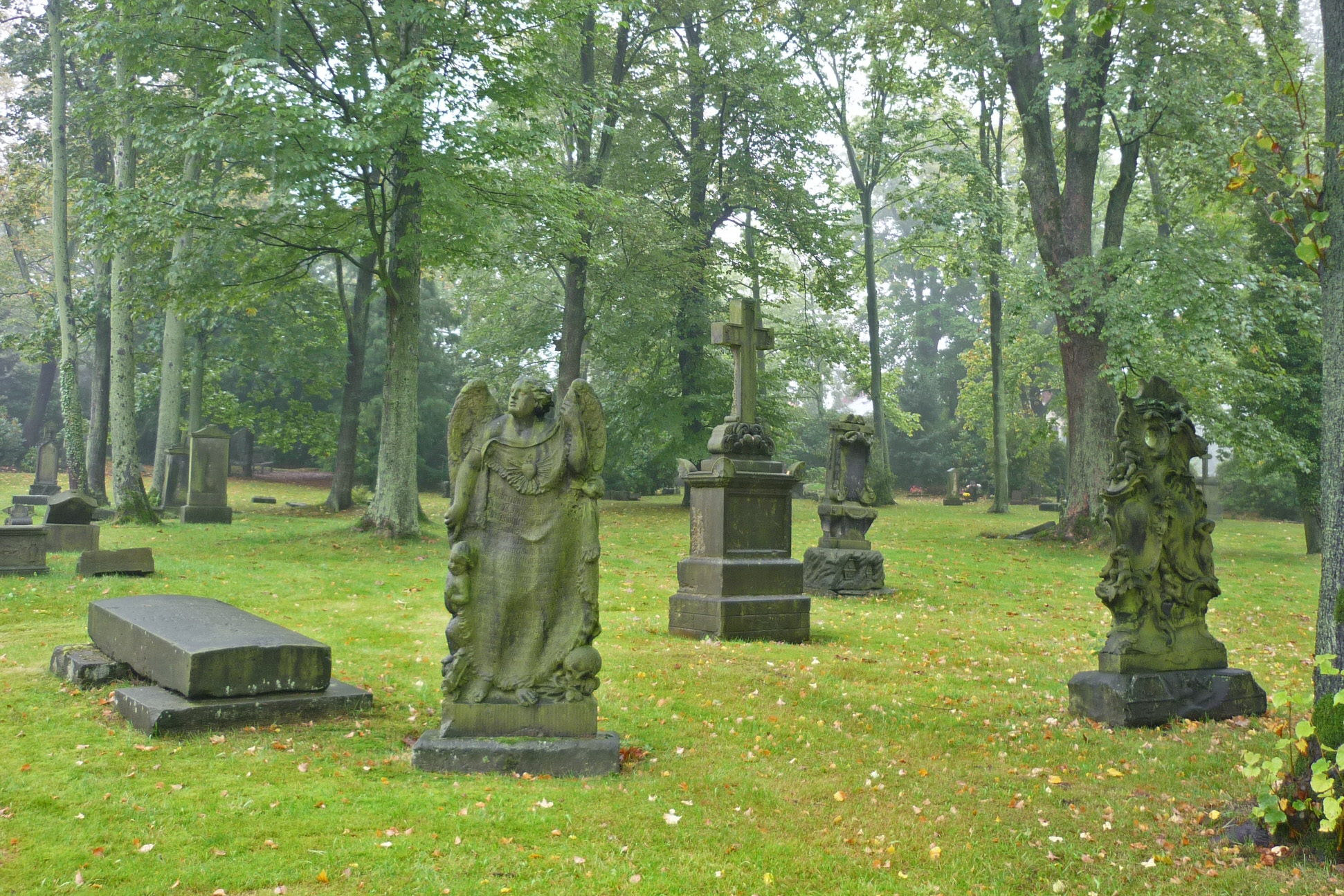 Alte Grabsteine auf dem Donatsfriedhof in Freiberg (Sachsen)